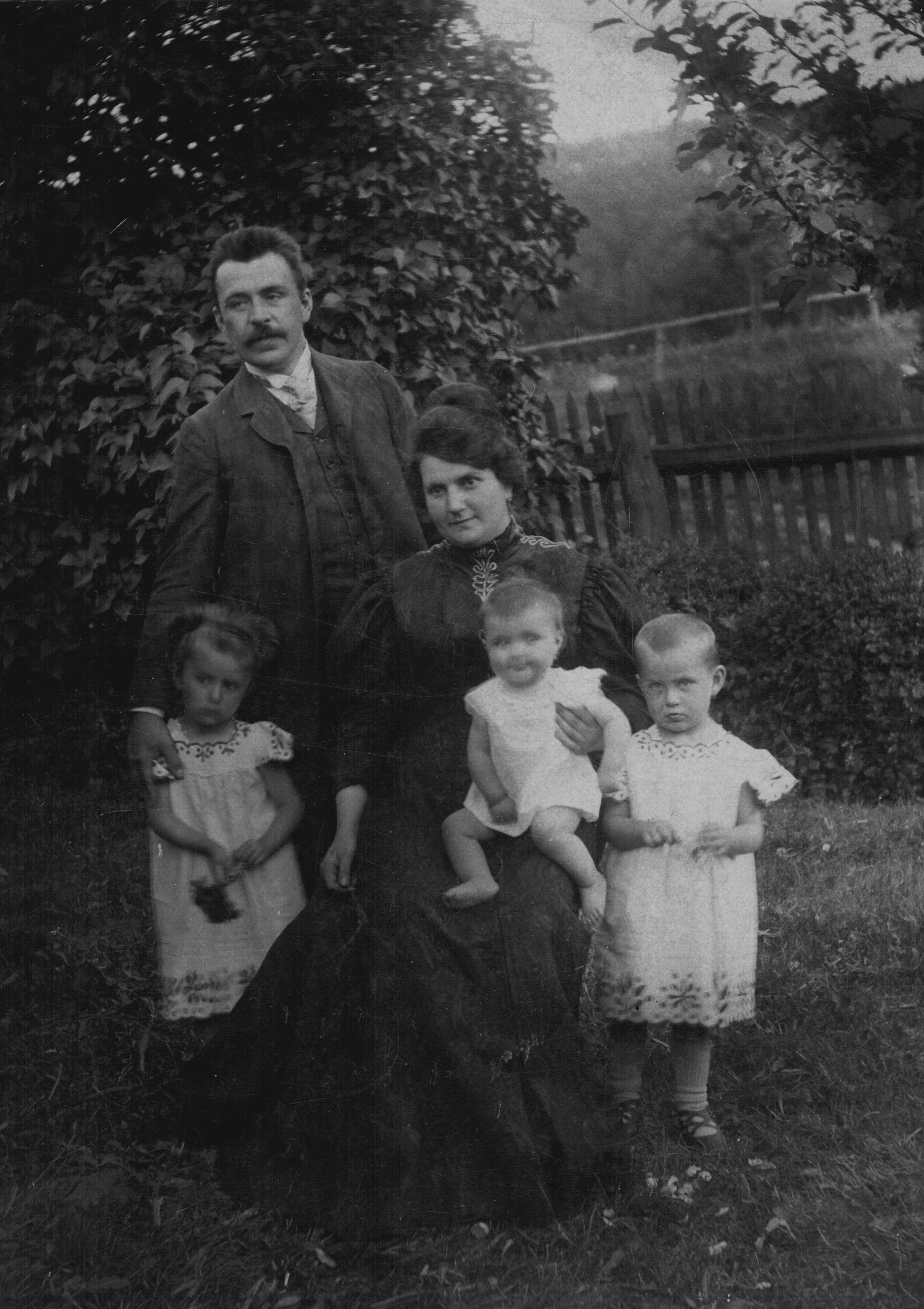 Děti zleva - Zora, Eva, Jitka